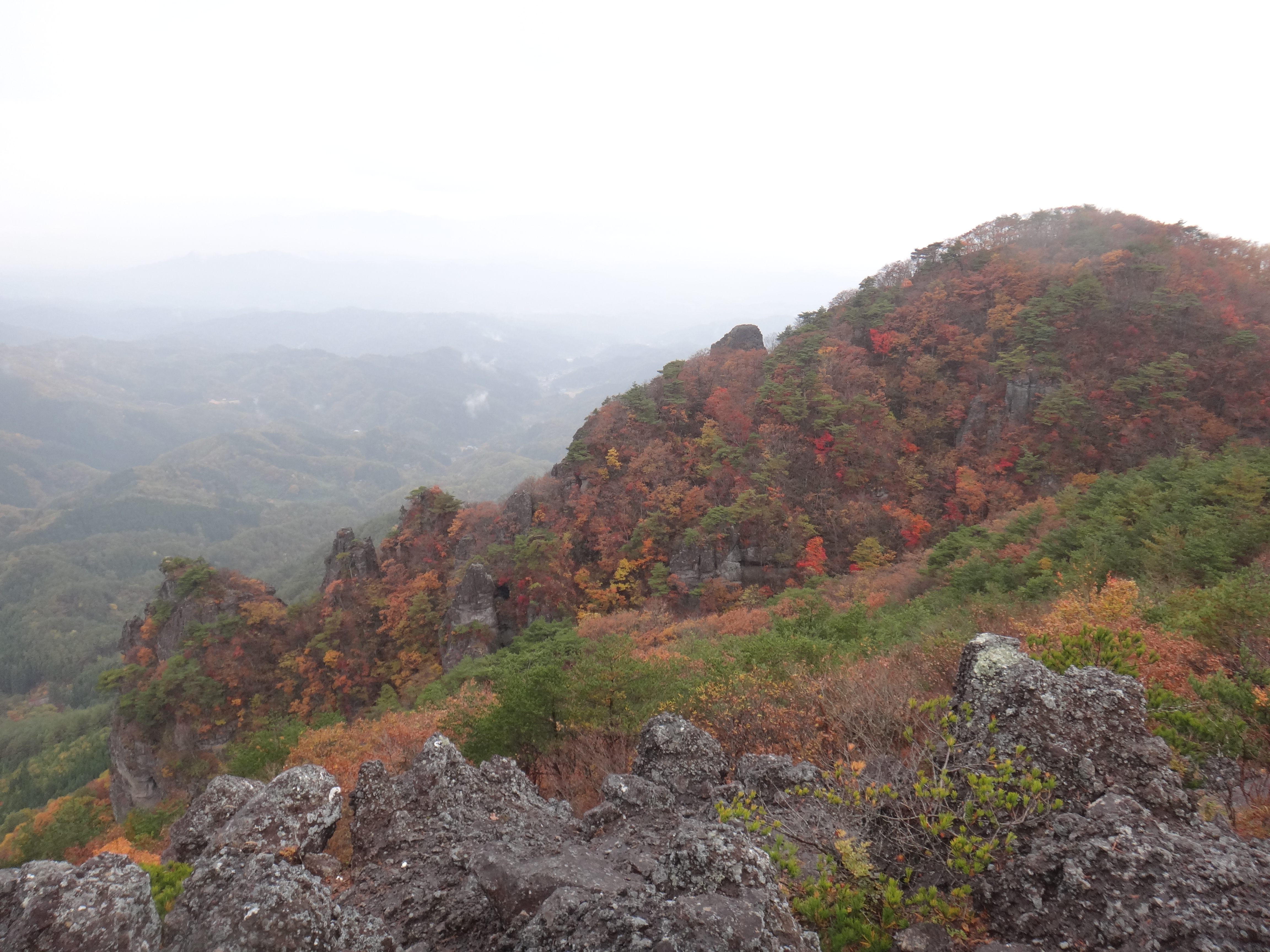 霊山の紅葉